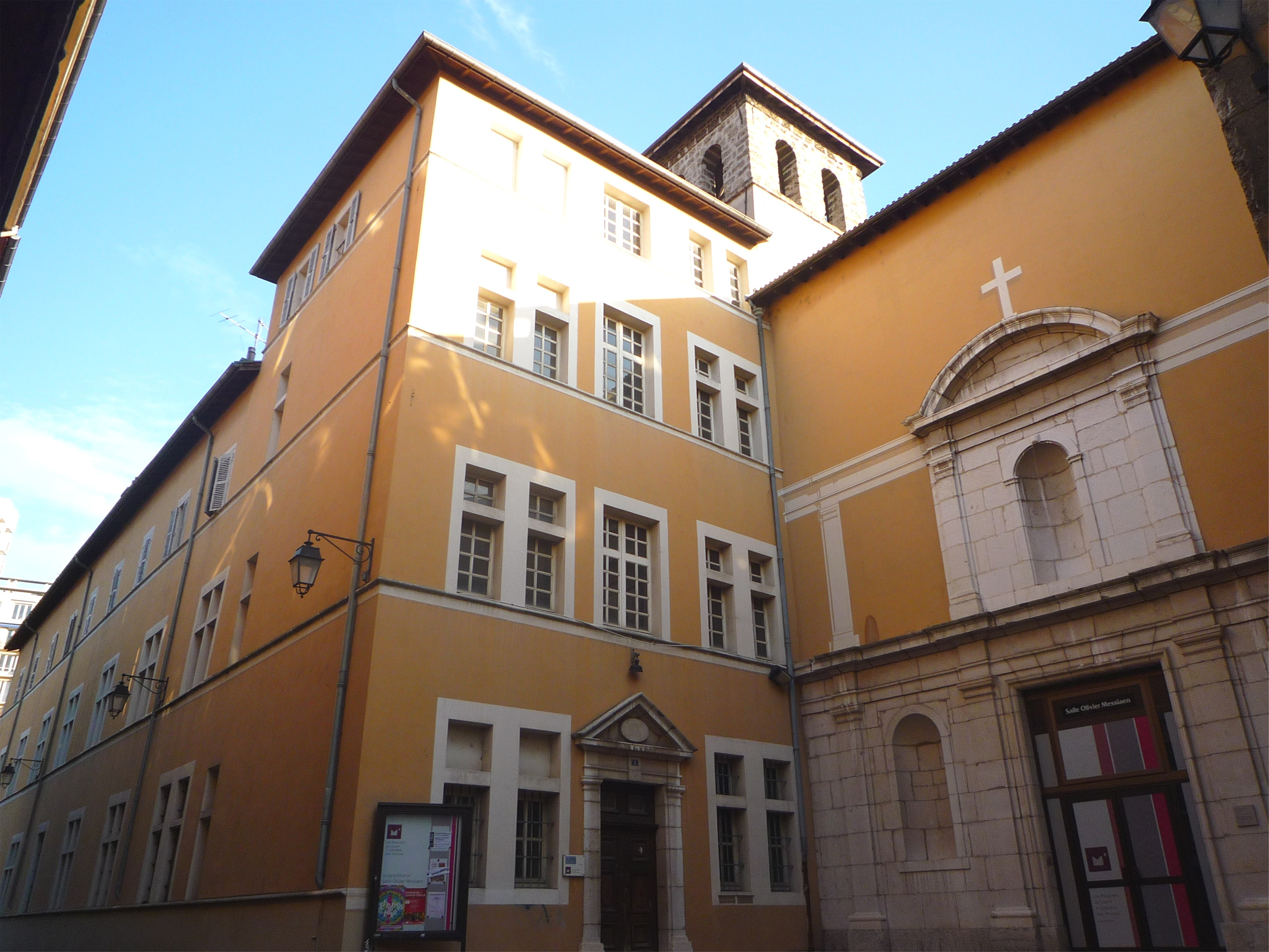 Couvent des Minimes (1646), côté rue du Vieux temple à Grenoble.